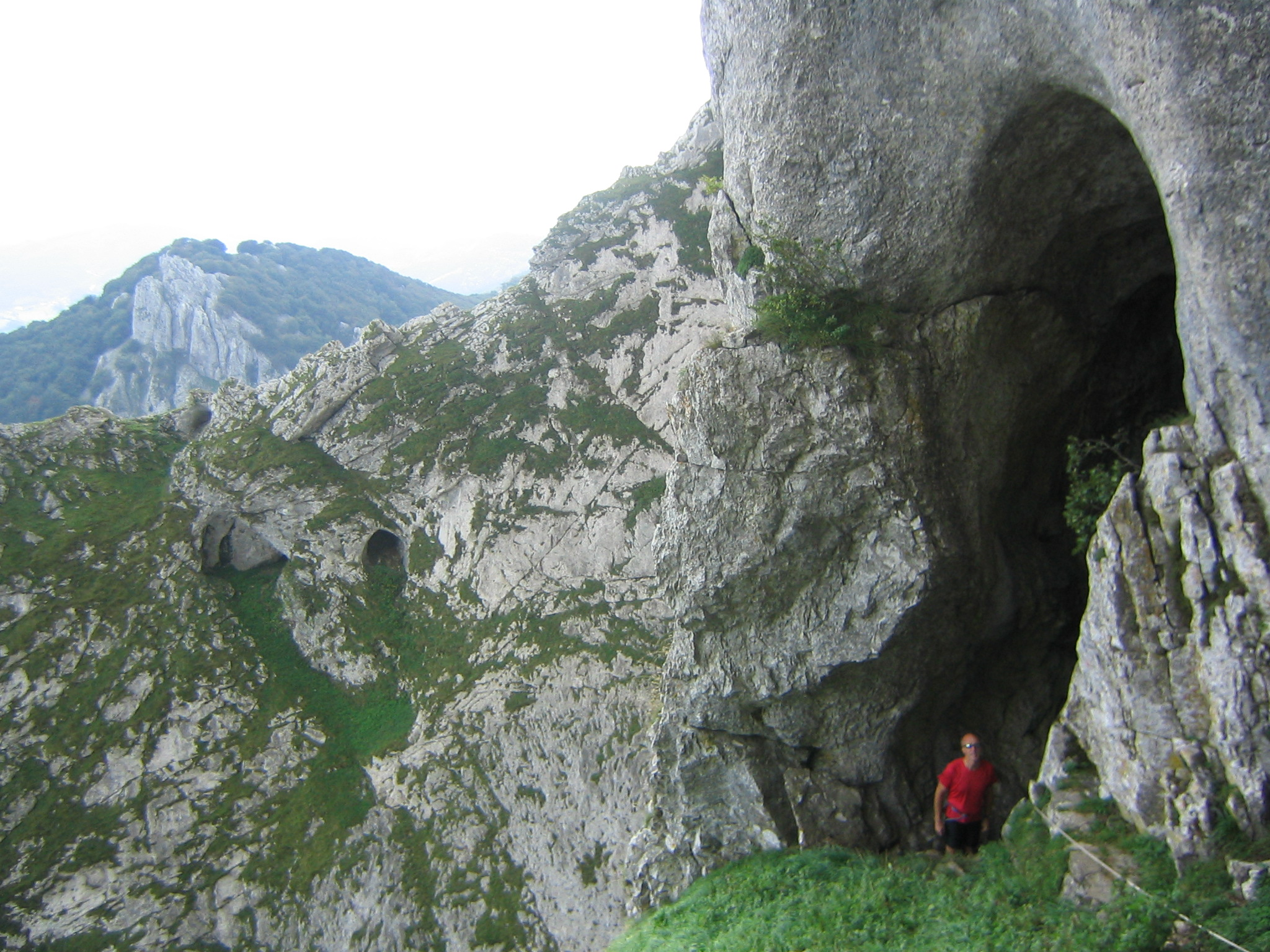 Entrada a la cueva de Mari. (Duranguesado)Vizcaya, País Vaco, España.